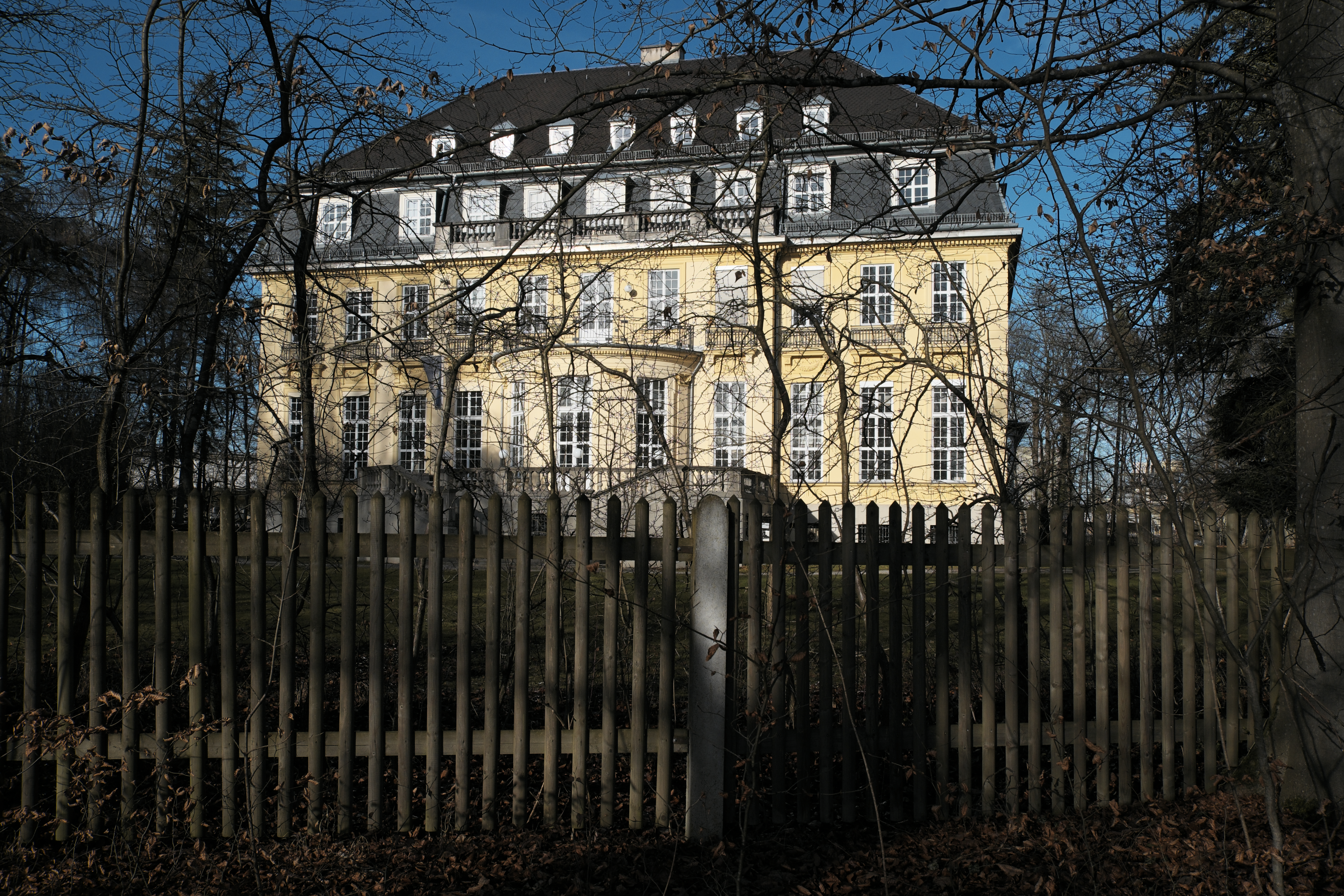 Villa Bellemaison in Höllriegelskreuth (Pullach im Isartal) im Landkreis München (Bayern/Deutschland), 1908 von Gustav von Cube für Carl Sternheim und Thea Sternheim errichtet